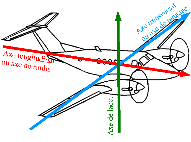 Dessin d'un avion et de ses axes de roulis, tangage et lacet